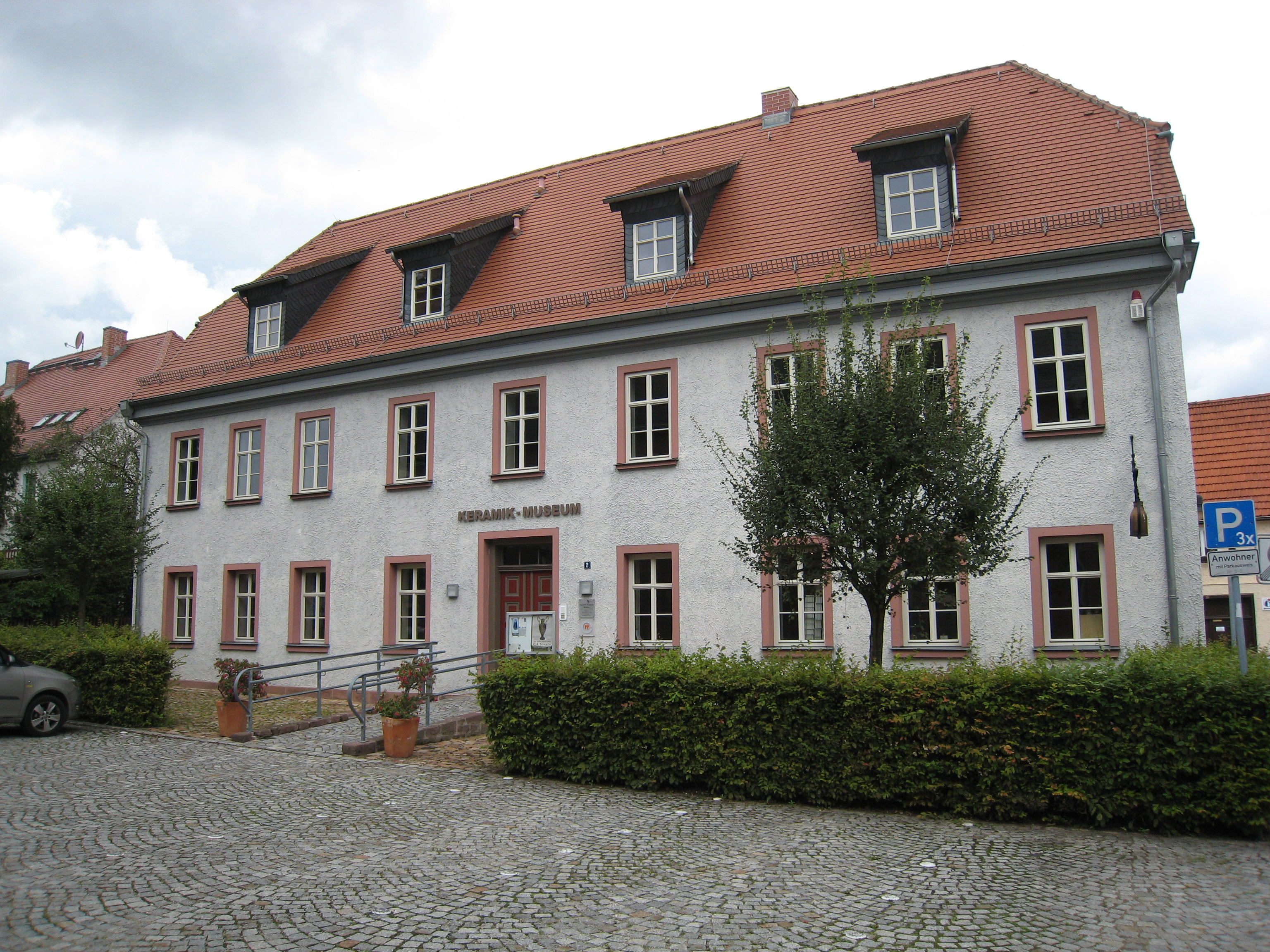 Keramikmuseum Bürgel 5